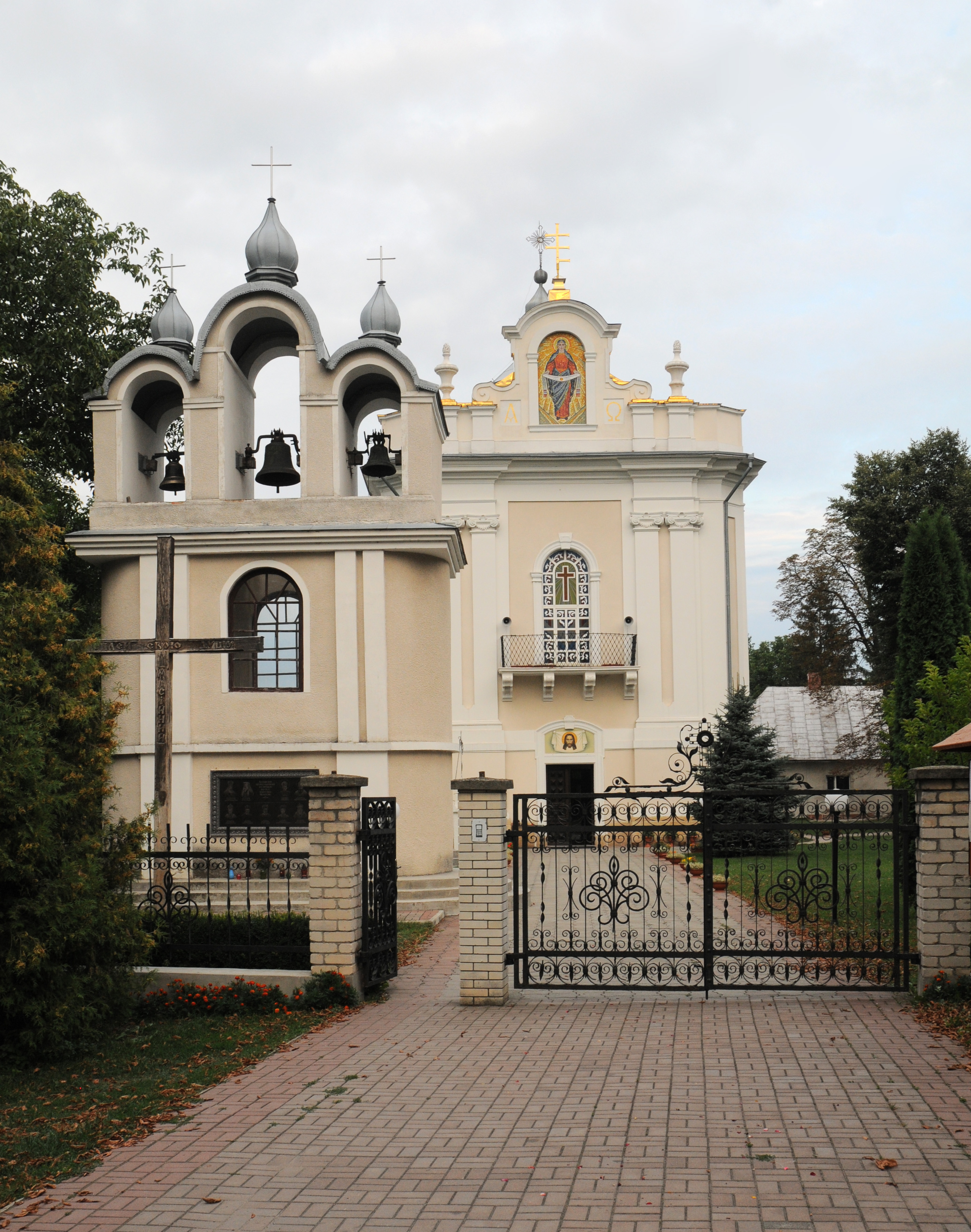 Городенка Успенська церква